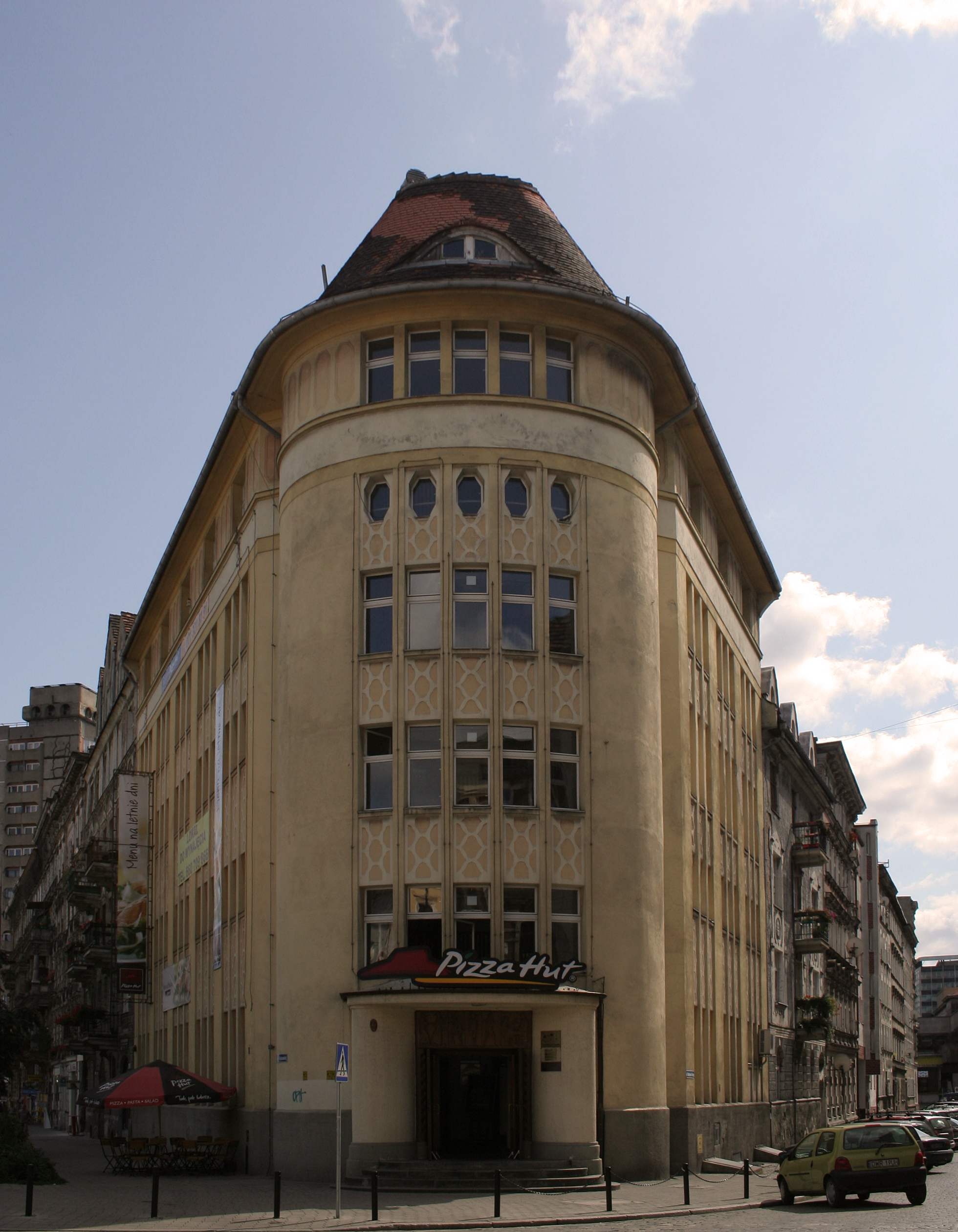 Dawna łaźnia miejska we Wrocławiu